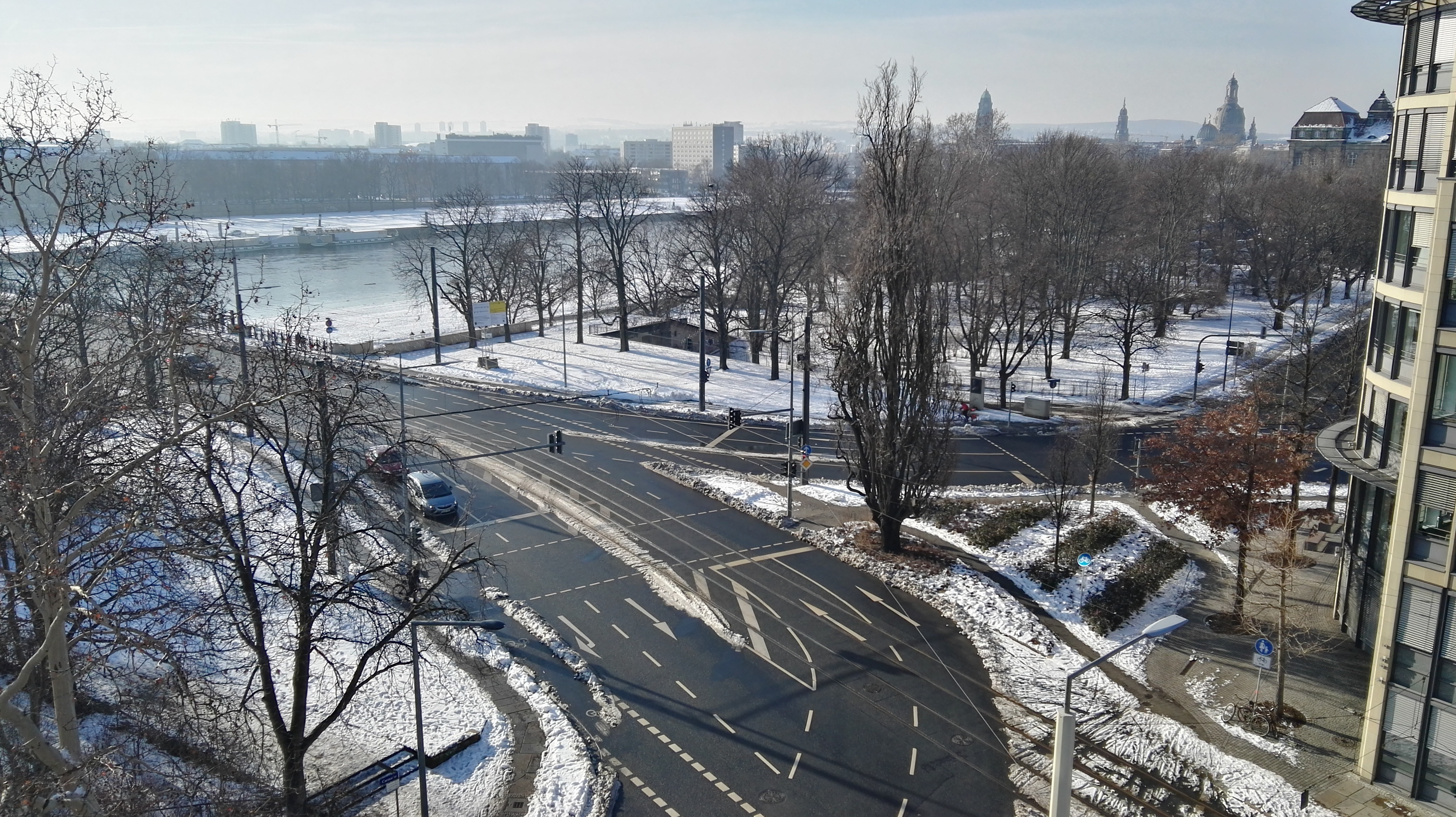 Rosa-Luxemburg-Platz in Dresden im Winter